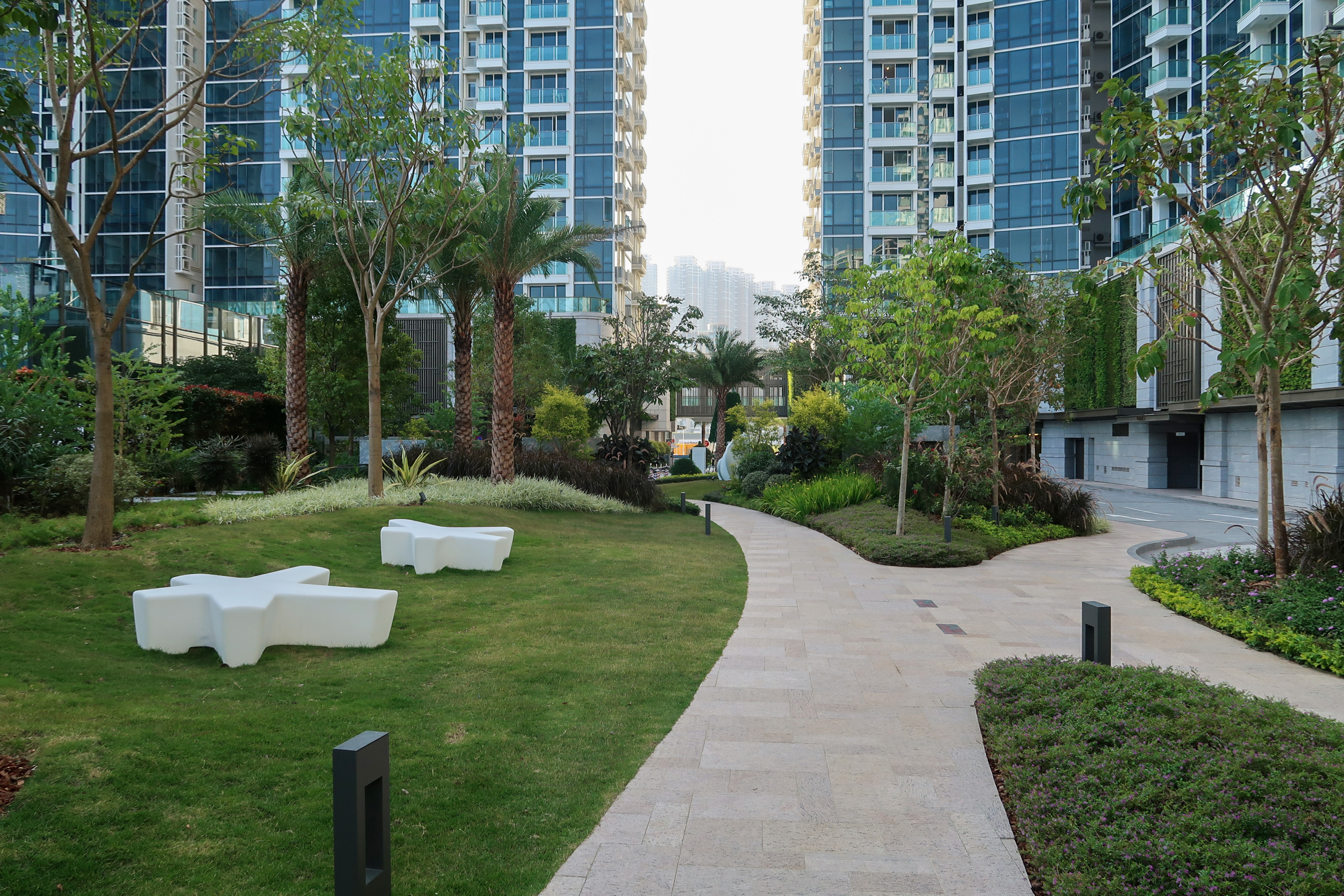 MONTEREY Landscape area